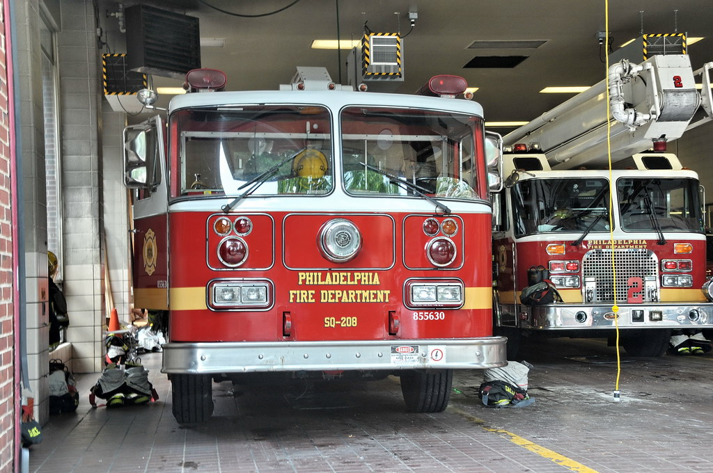 Arch Street